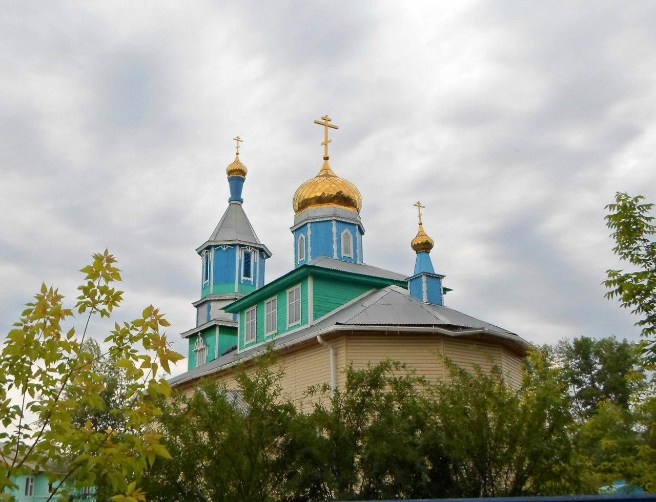 2016 год